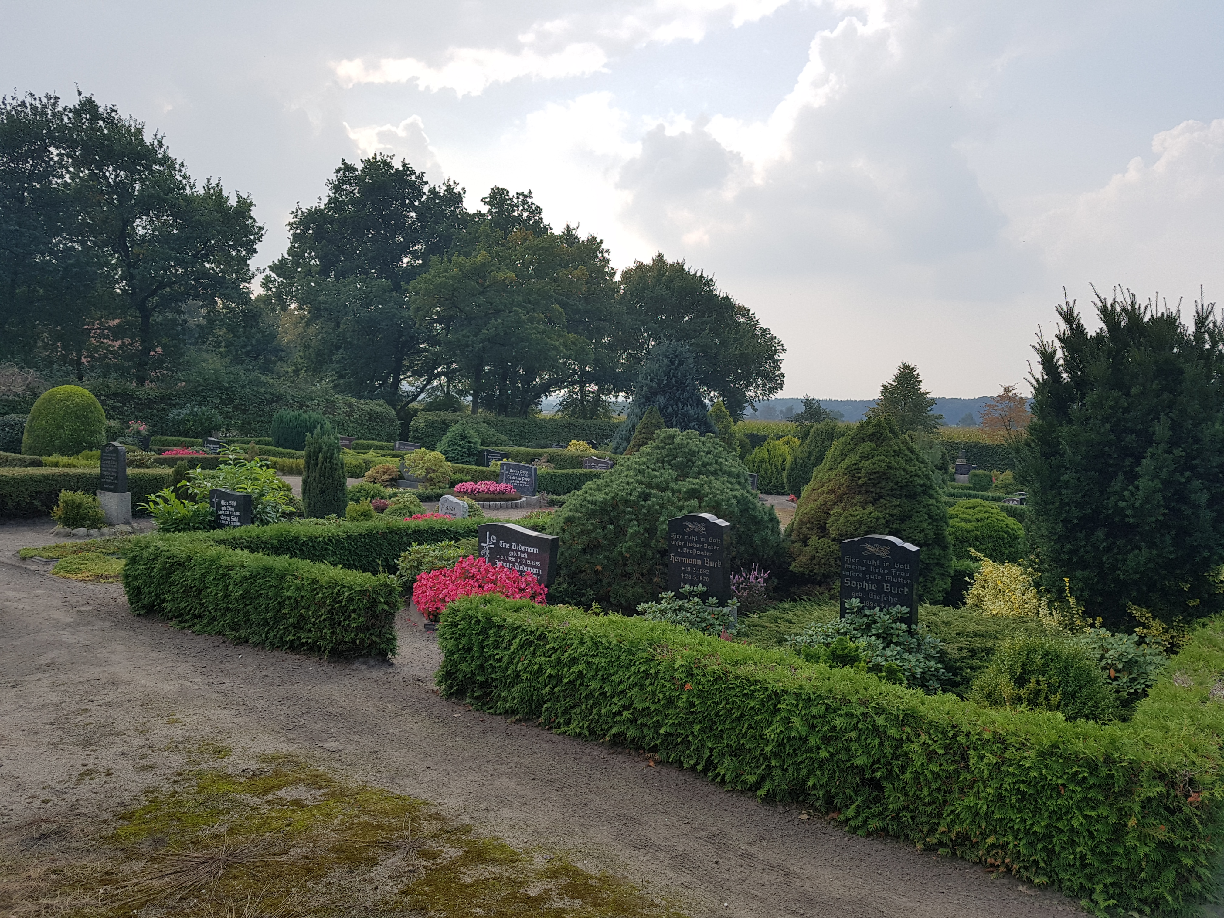 Karkhoff in Hollen